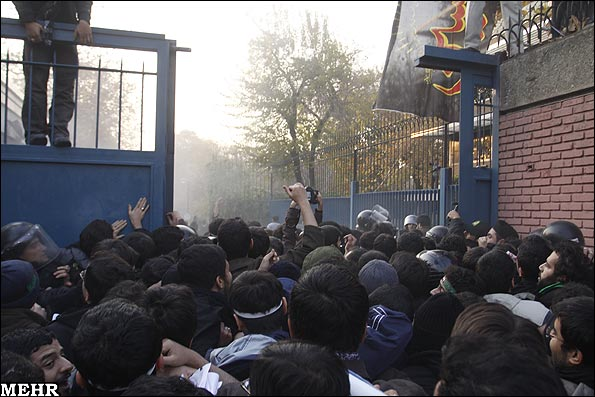 حمله به سفارت بریتانیا در تهران